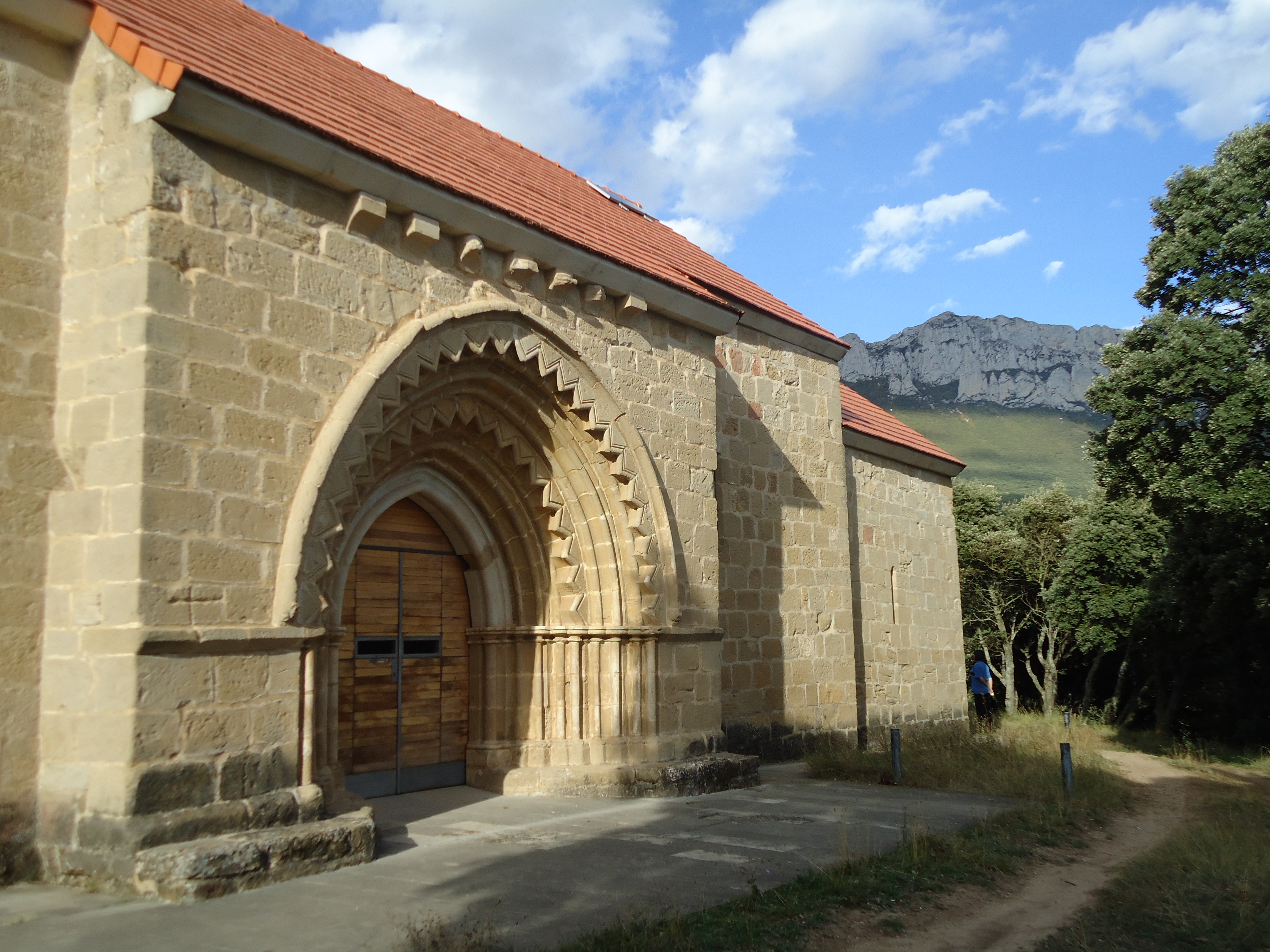 Berberanako baseliza Guardia herrian (Arabako Errioxa)